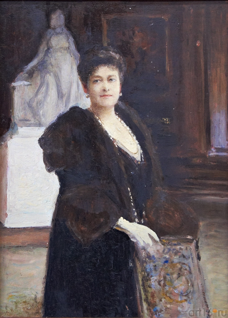 Портрет Великой княгини Марии Павловны - последнего Президента Императорской академии художеств. 1910-е. Визель Э.О. Государственный музей изобразительных искусств Республики Татарстан